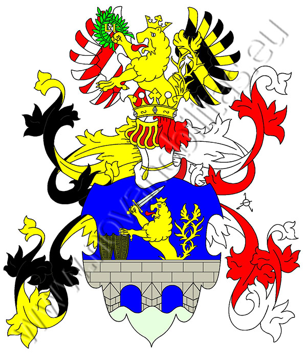 Erb Zatočilů z Lowenbrucken